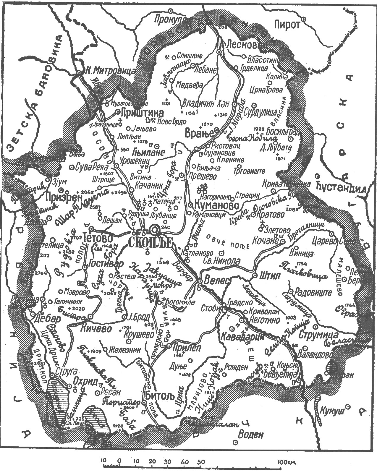 Карта Вардарске бановине.